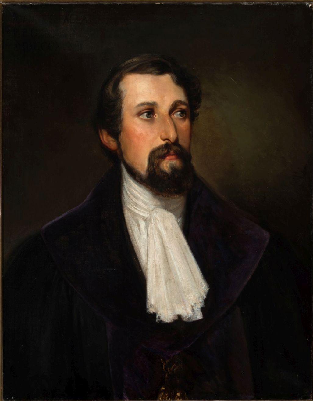 Johannes Fallati, Künstler Karl von Müller, 1848